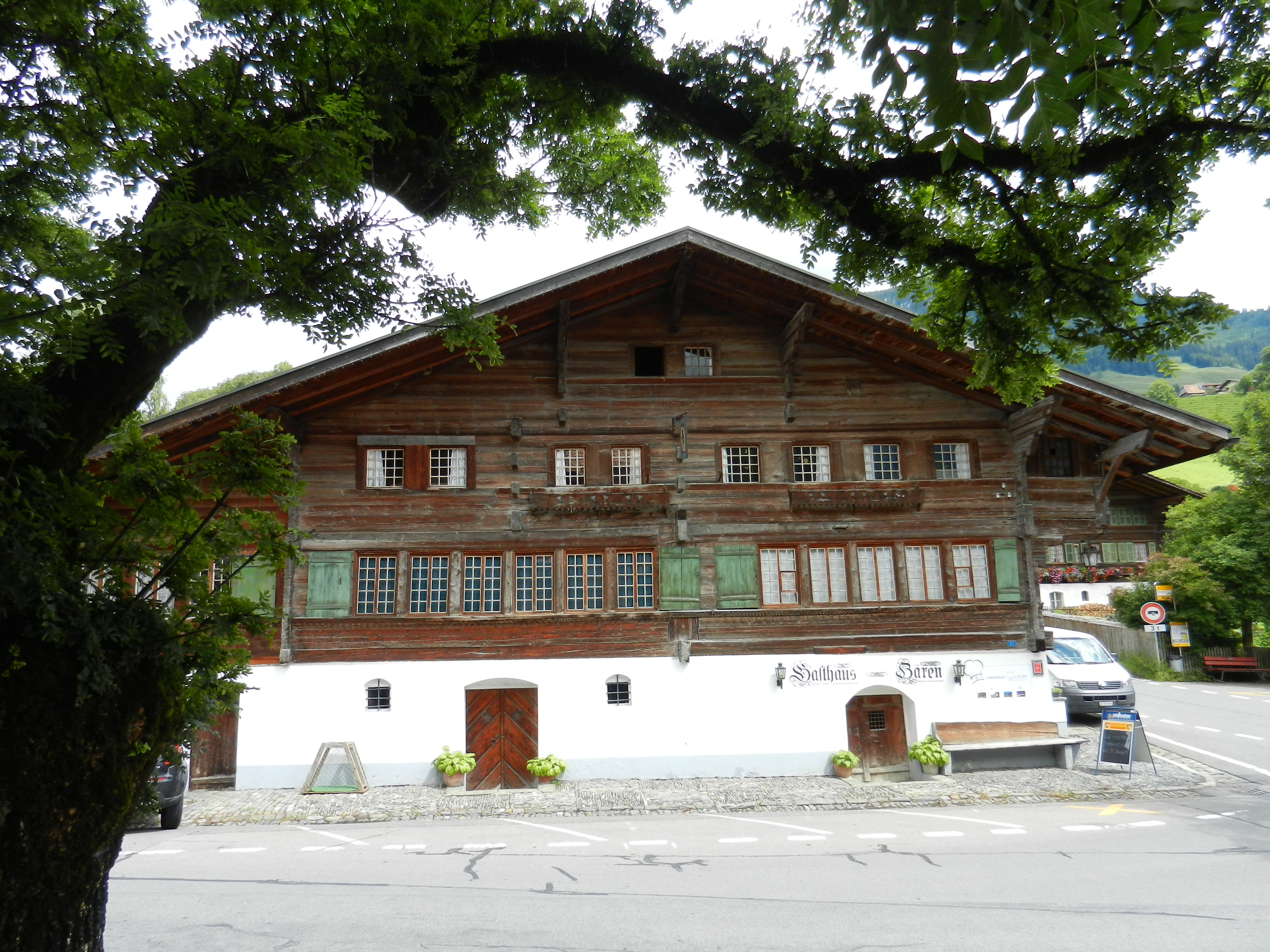 Schweizer Kulturgut von nationaler Bedeutung, historische Gaststätte mit teilweise originalem Erhaltungszustand aus dem 16.Jhdt.